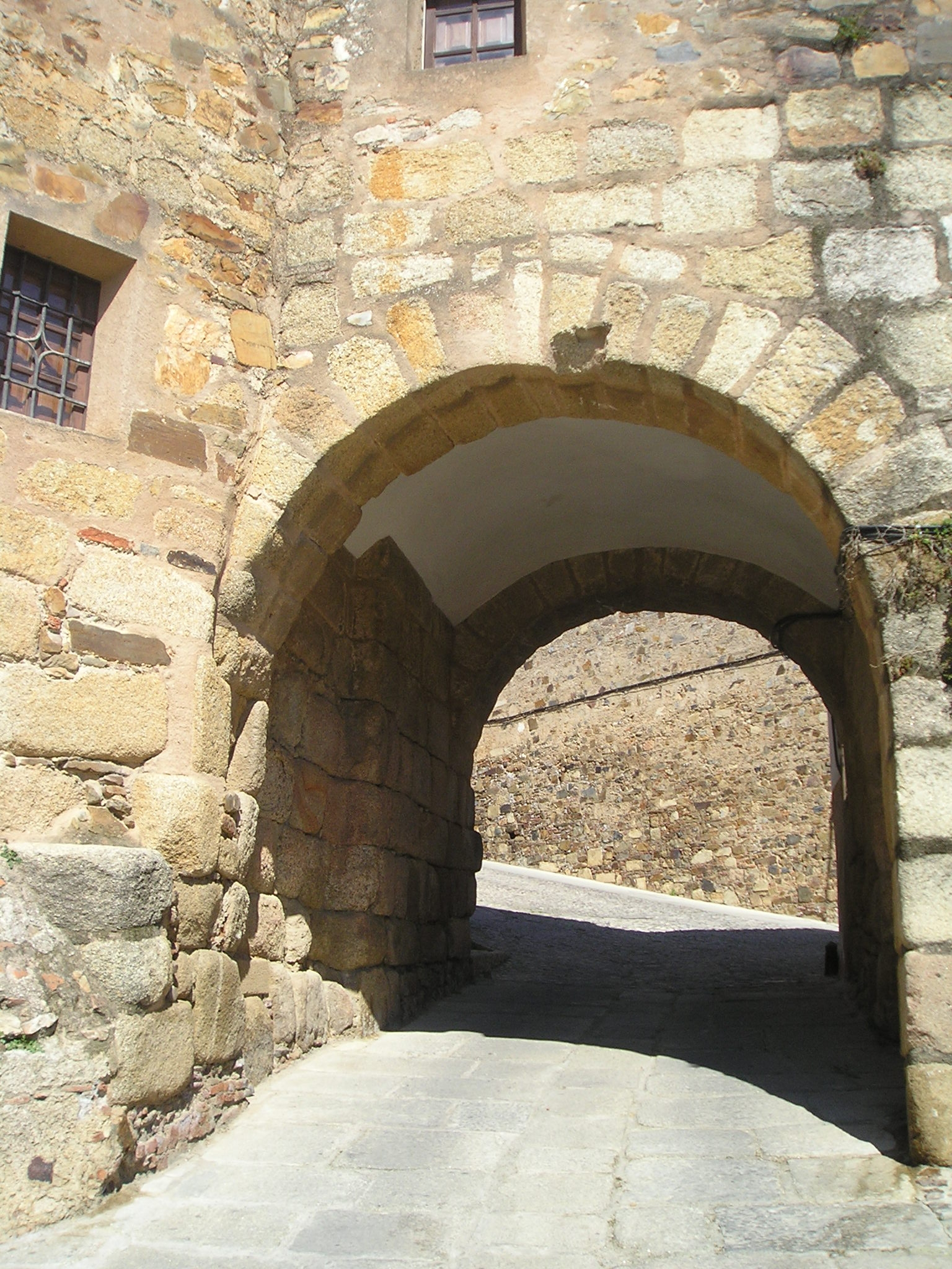 Puerta de la muralla romana medieval de Cáceres, llamada Arco del Cristo; es uno de los escasos lugares de la muralla en los que aparecen elementos constructivos romanos.